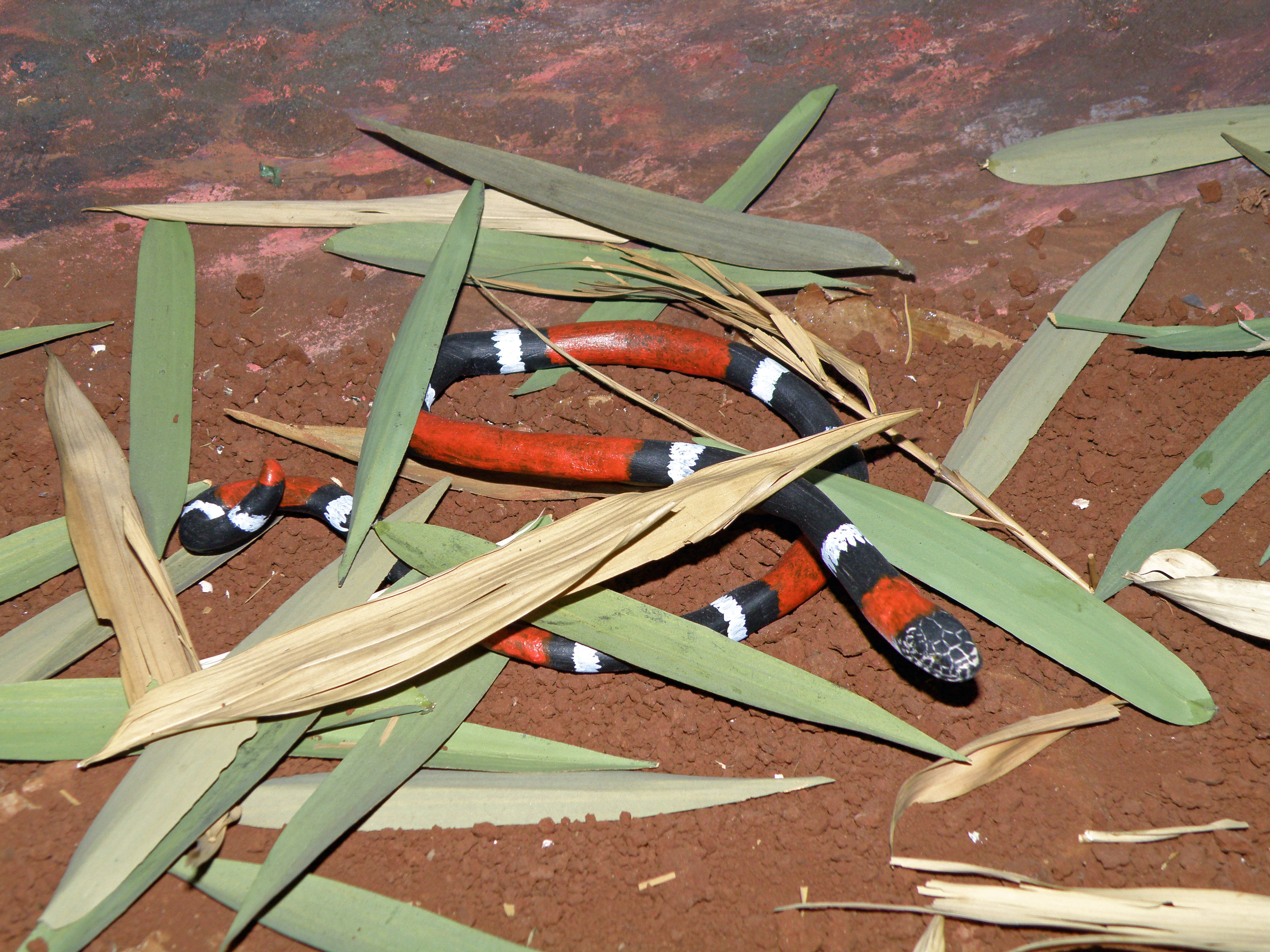 Víbora de coral chaqueña (Micrurus pyrrhocryptus).